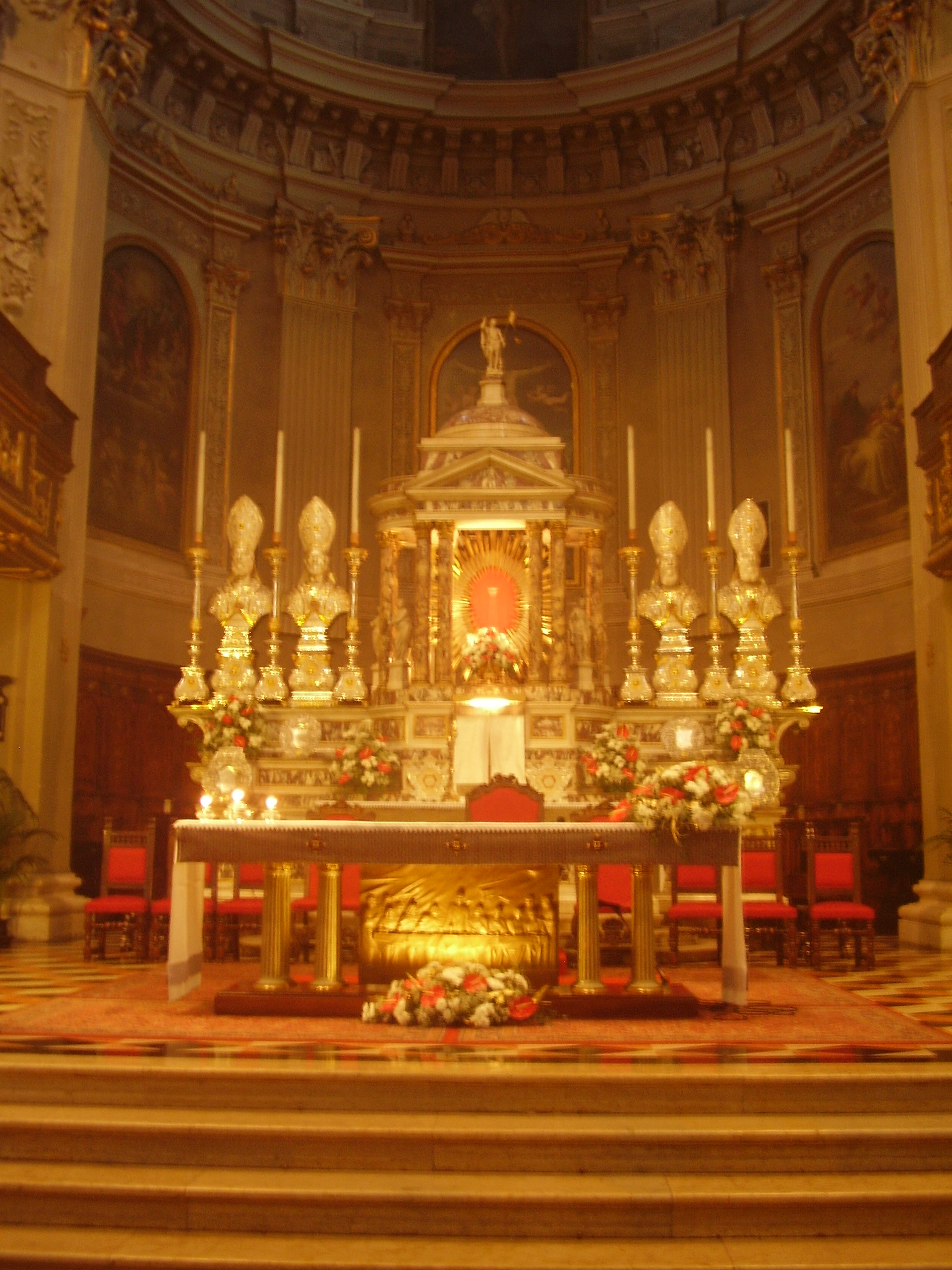 Главный алтарь в приходском храме Сериате